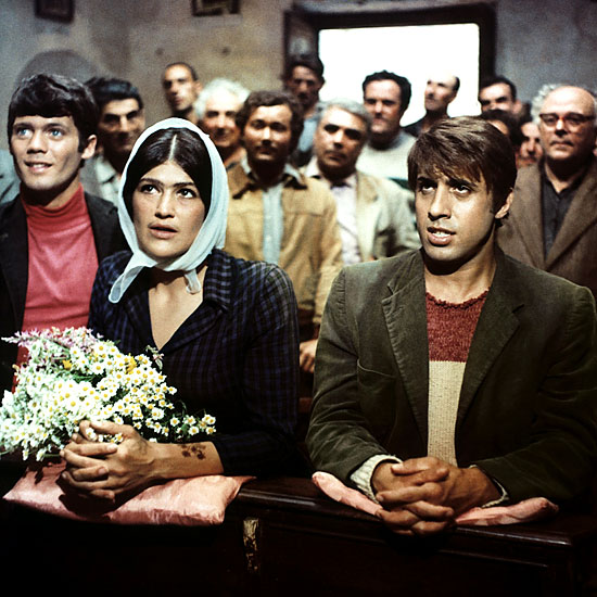 Film Serafino